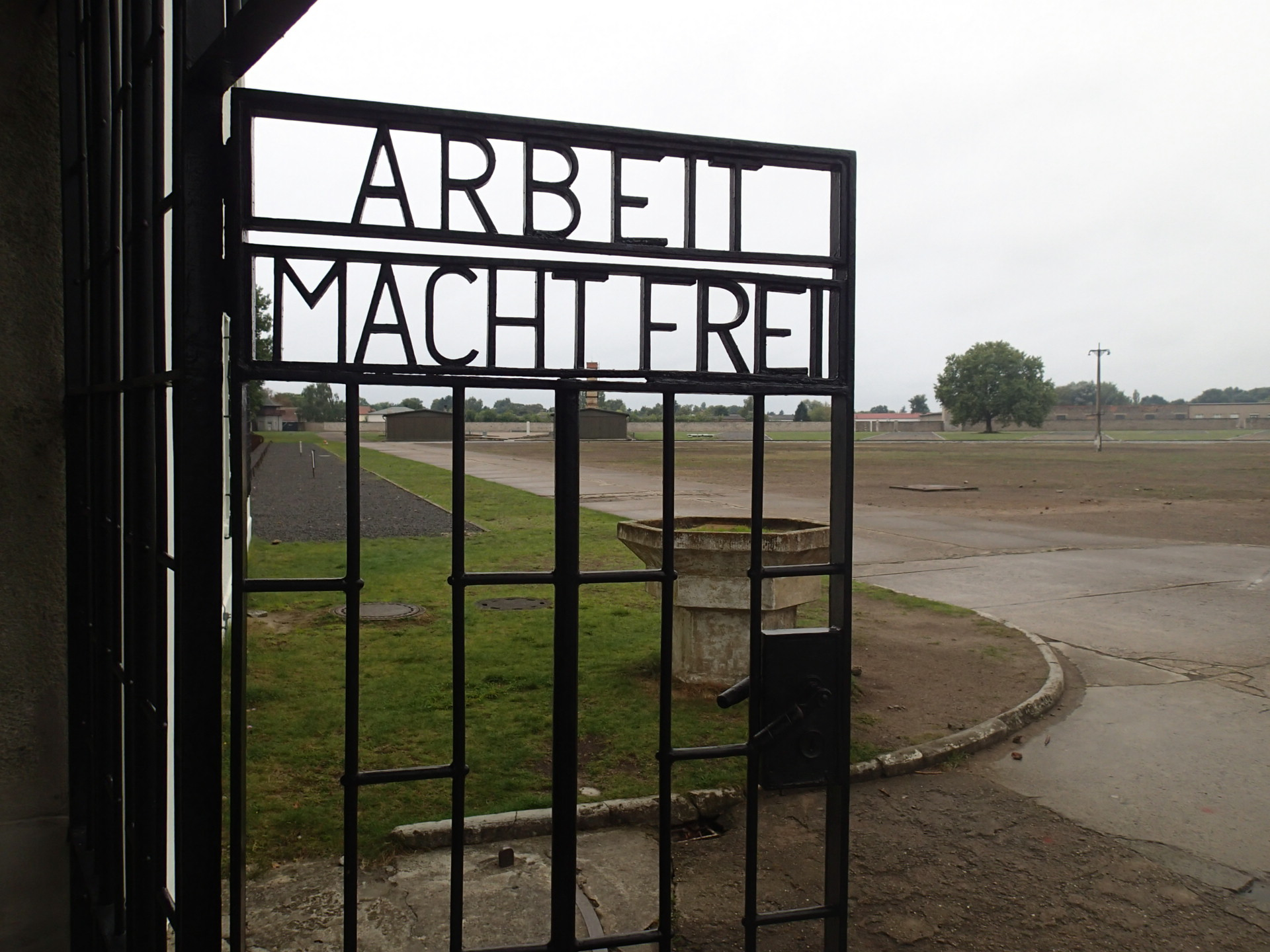 Sachsenhausen Camp